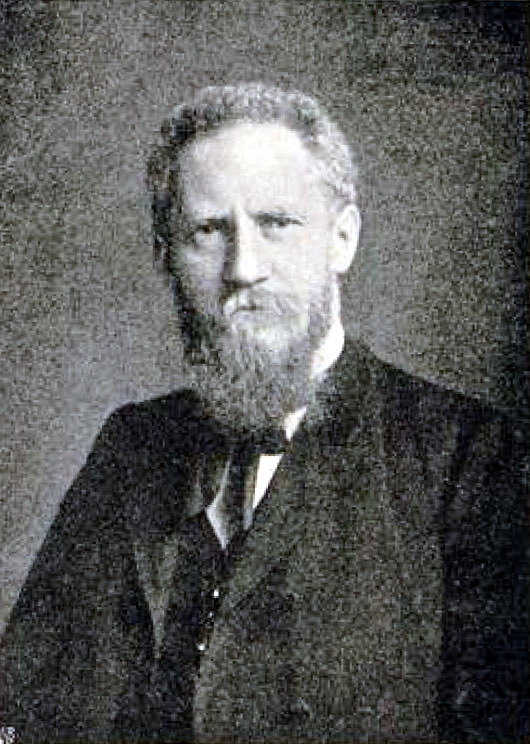 Georg Oskar Immanuel von Hase (1846 -1921) deutscher Verleger und Buchhändler